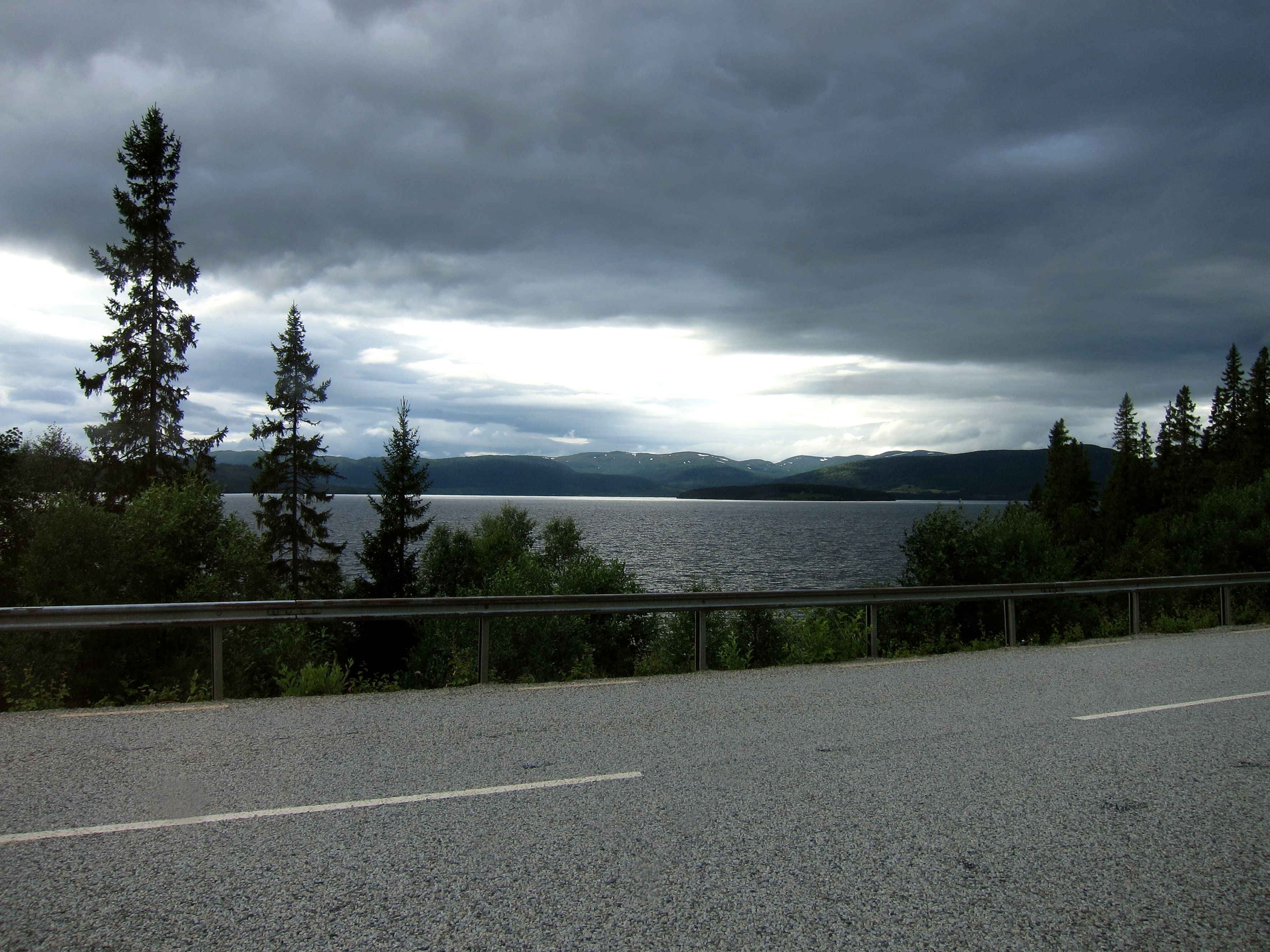 Vildmarksvägen och Stor-Jorm